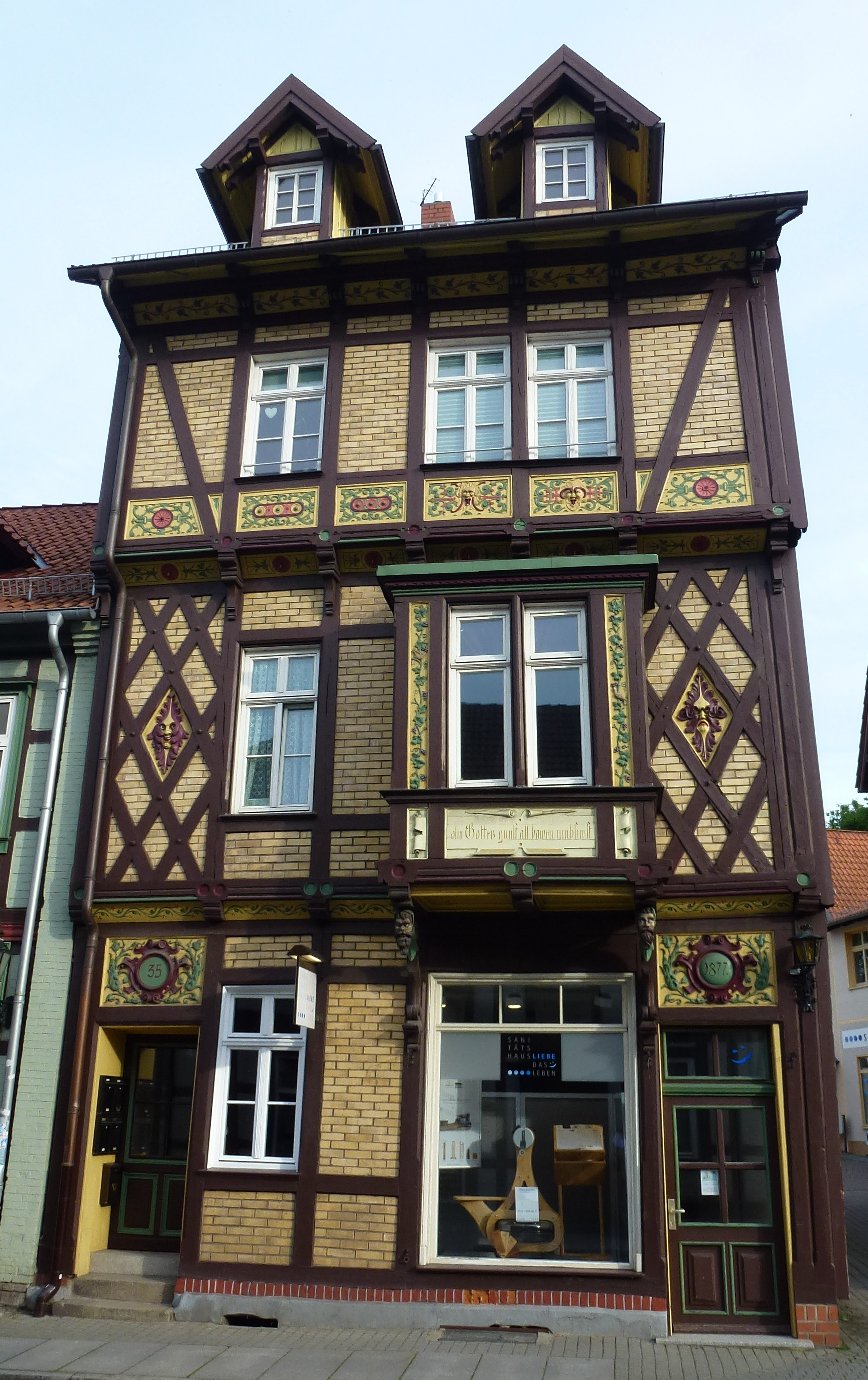 Westernstraße 35 in Wernigerode